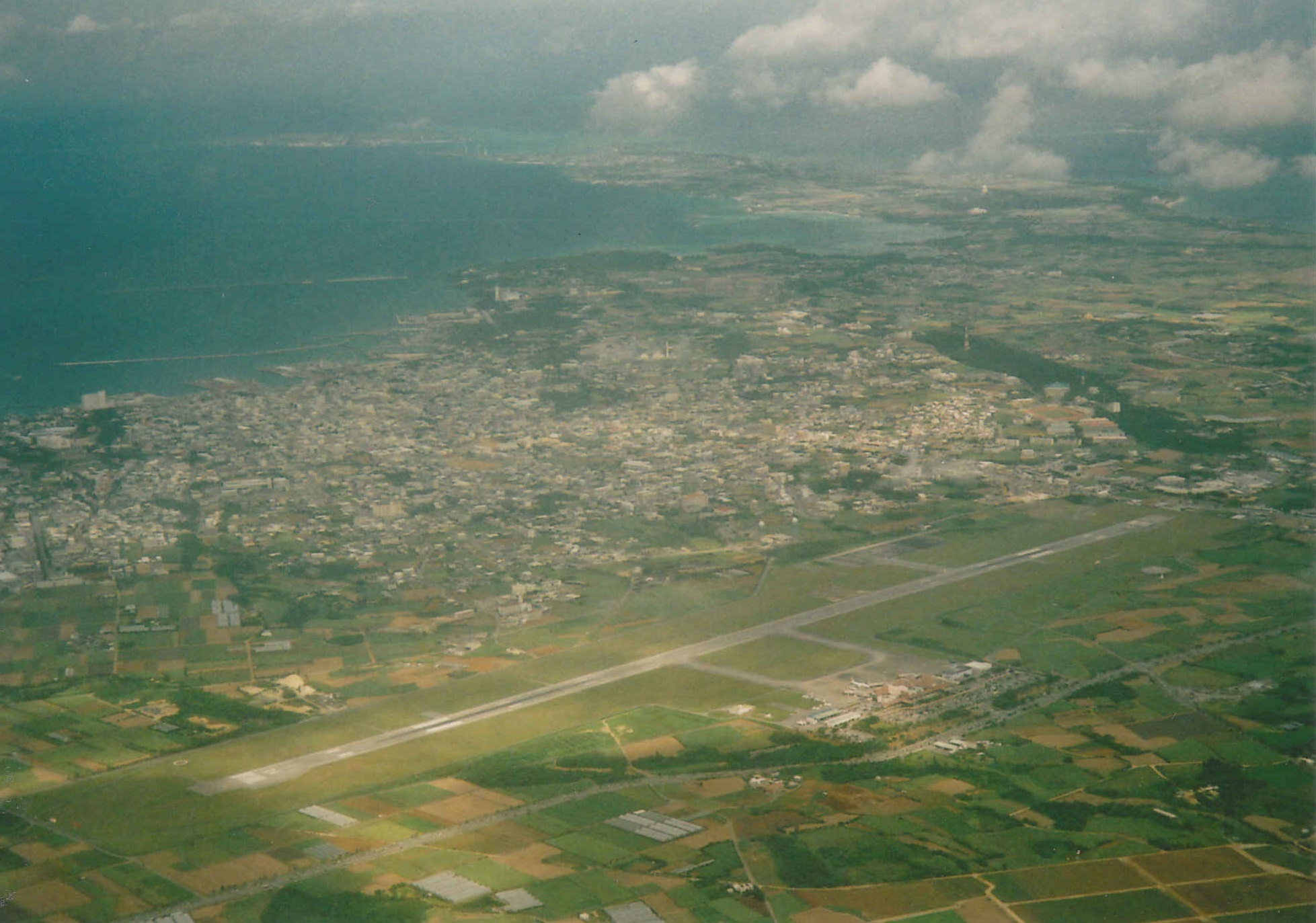 宮古空港（空撮）